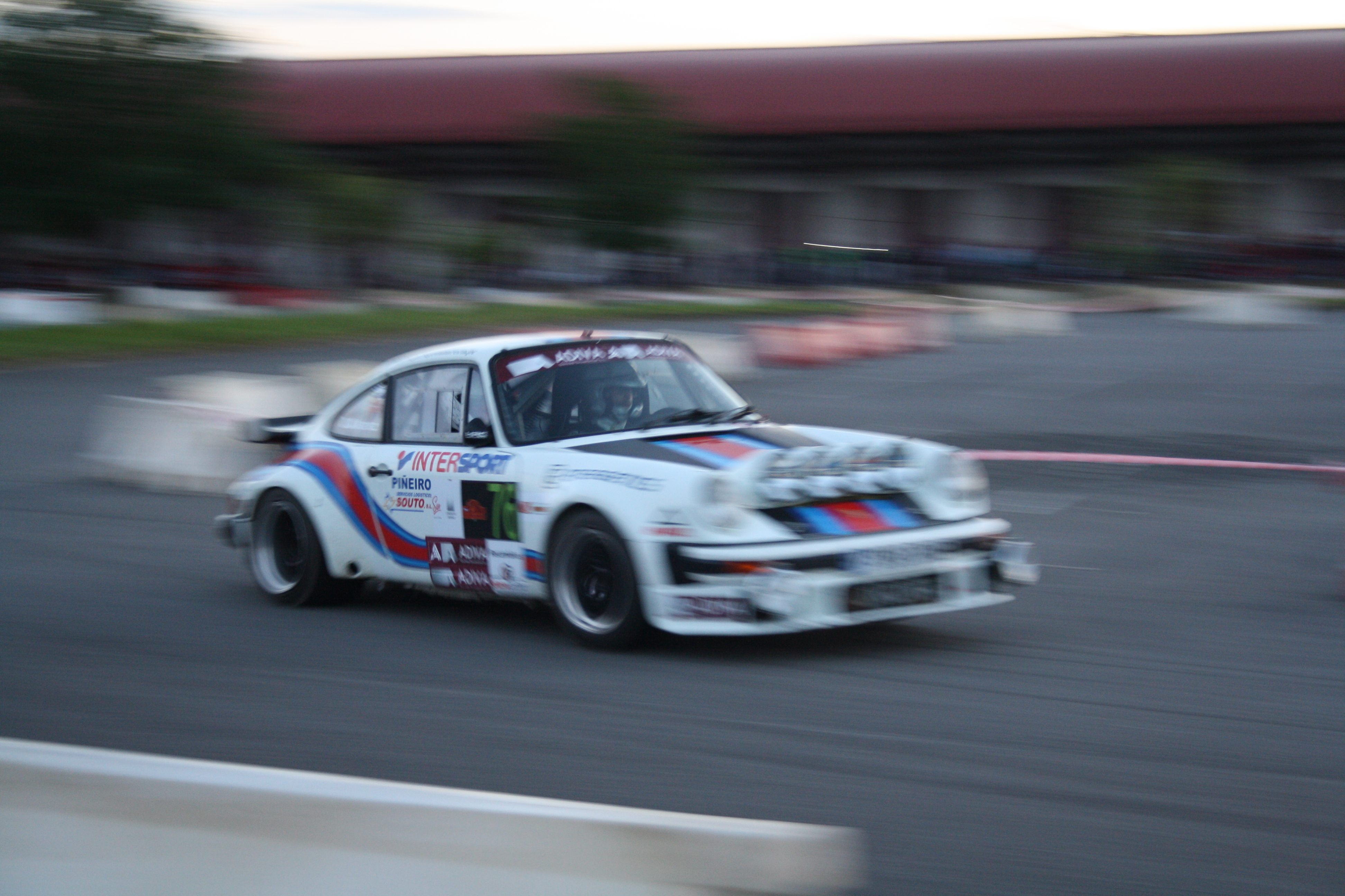 Rally Botafumeiro 2014. Tramo urbano que cerraba el rally disputado en el Recinto Feiral de Amio. Santiago de Compostela.